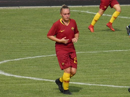 San Polo d'Enza, stadio comunale: fasi di gioco dell'incontro tra il Sassuolo e la Roma, prima giornata di Serie A di calcio femminile della stagione 2018-2019.